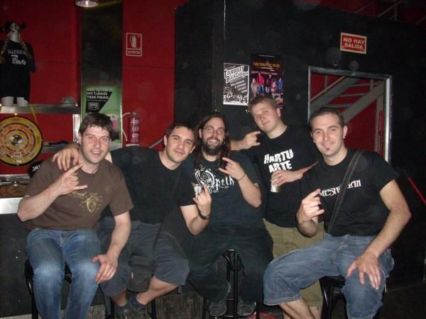 Miembros del grupo